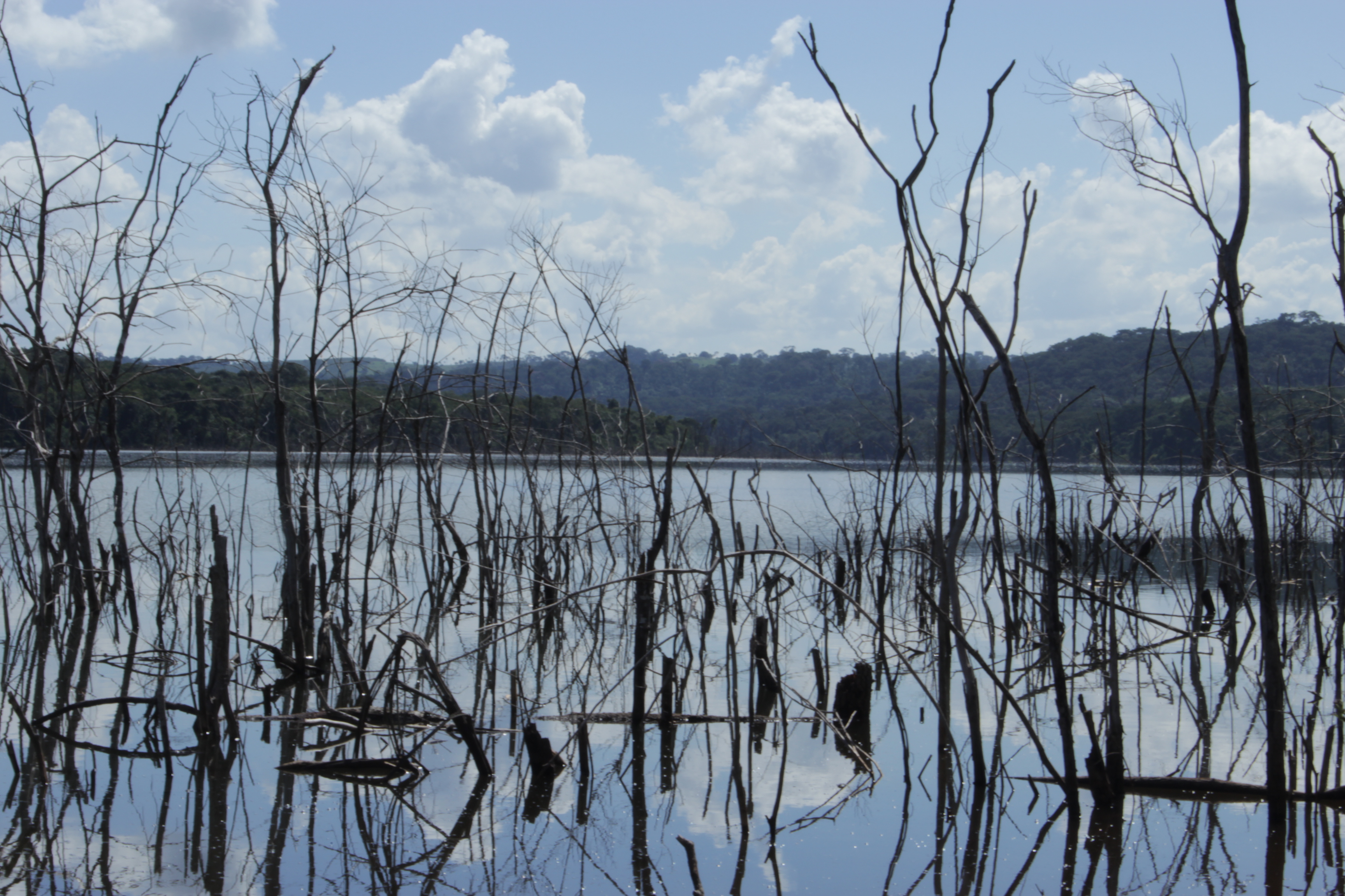 Fotografia de flora e fauna encontradas durante caminhadas no Parque Estadual Altamiro Pacheco